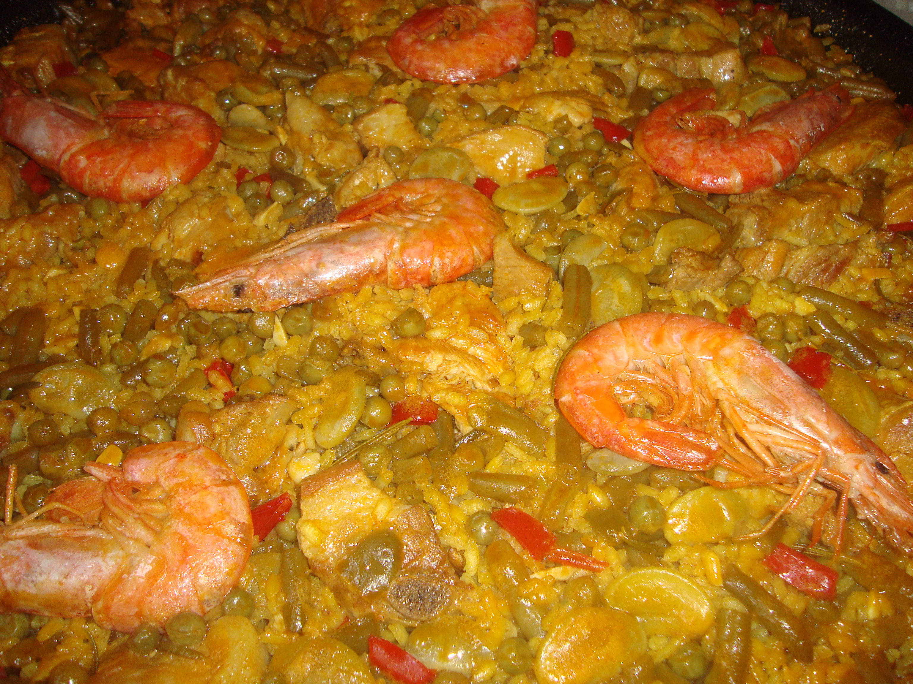 Paella de arróz con gambas, verduras y carne. Paella valenciana.